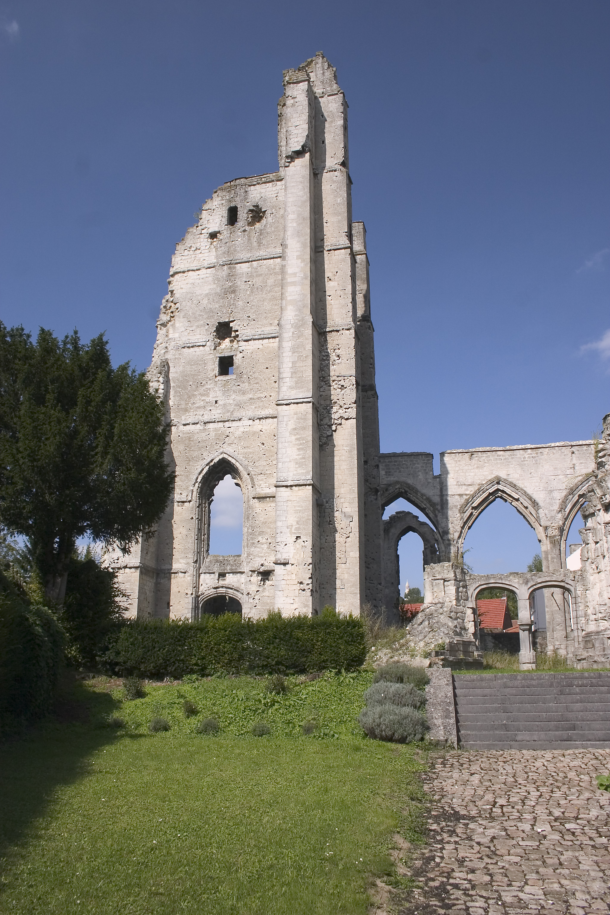 Les ruines de l'église d'Abalin-saint-nazaire